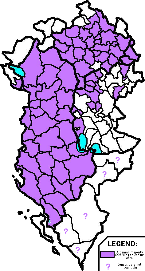 „Greater Albania“